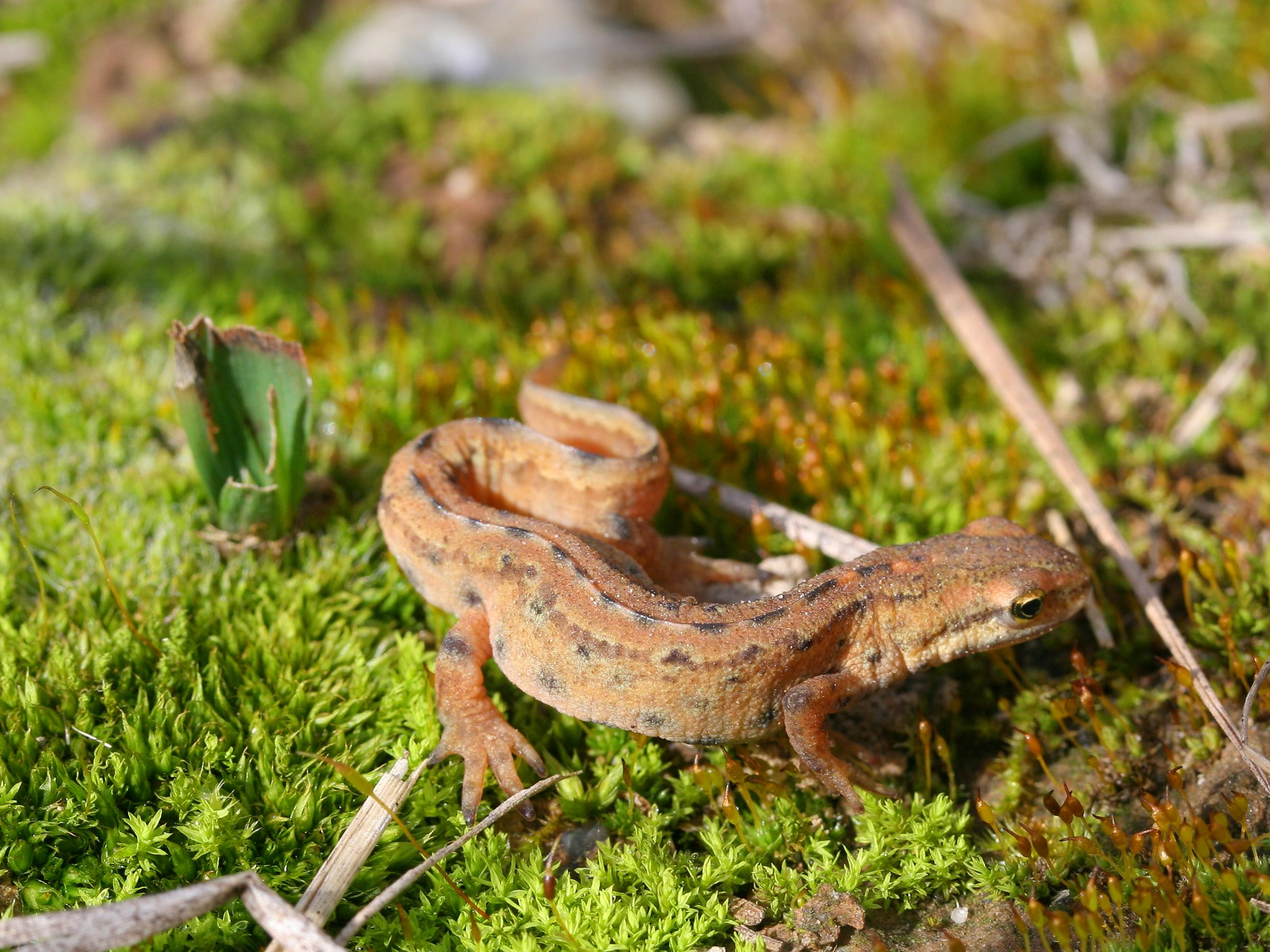 Teichmolch (Triturus vulgaris), Männchen